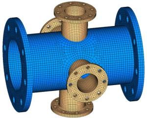 mit Hexaederelementen diskretisiertes Finite Elemente Modell